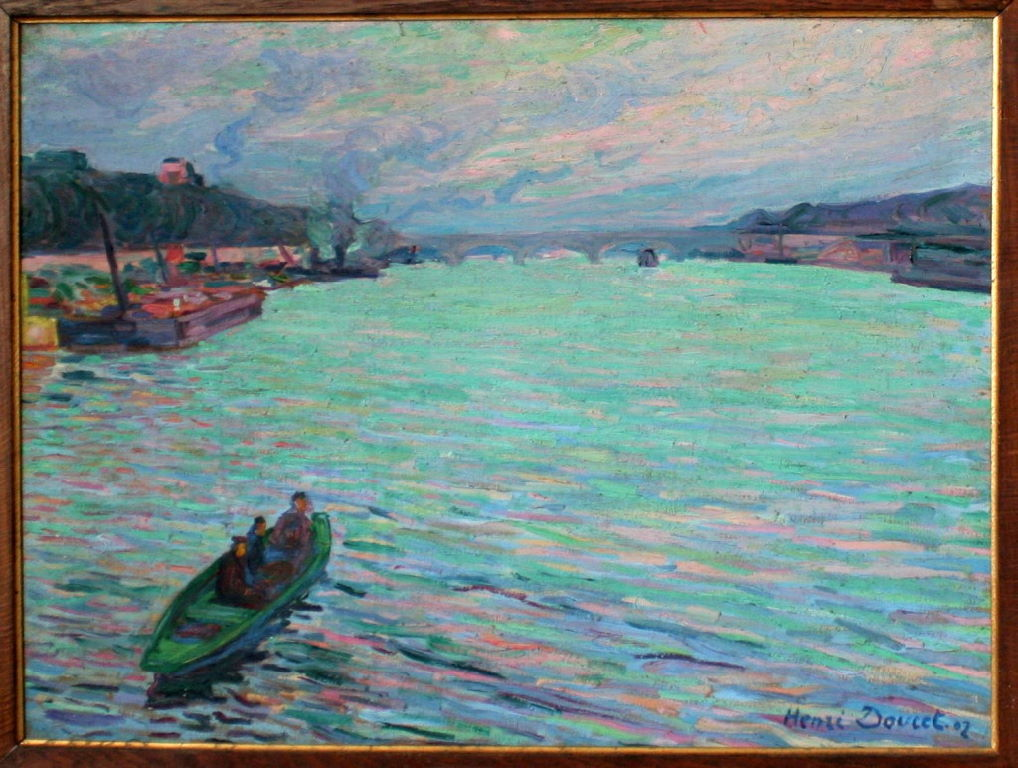 Vue du pont d'Austerlitz depuis un bateau sur la Seine